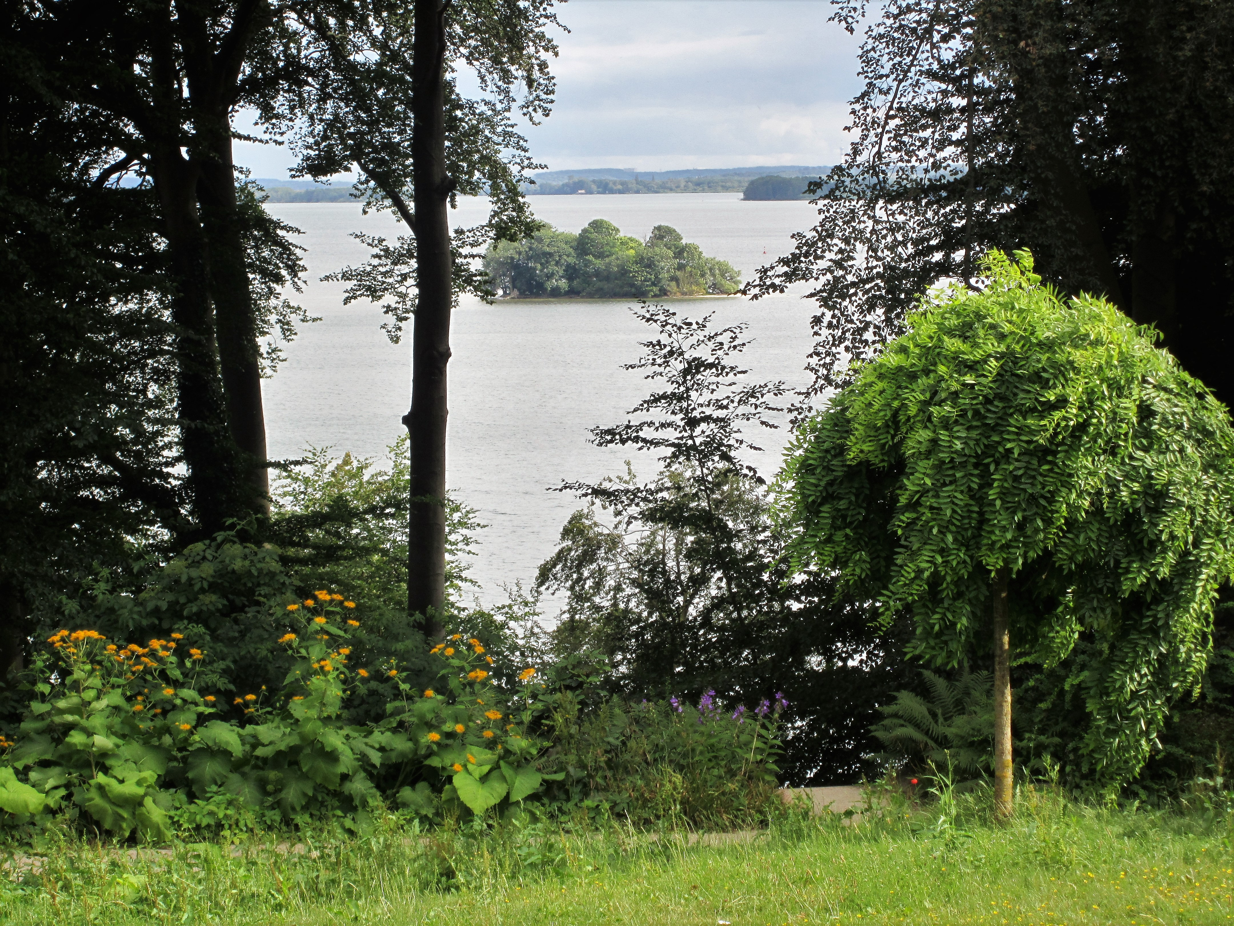 Blick vom Park des Schlosses Wiligrad in Richtung Südost über den Schweriner Außensee